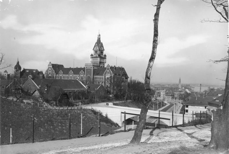 Potsdam, Reichsarchiv auf dem Brauhausberg